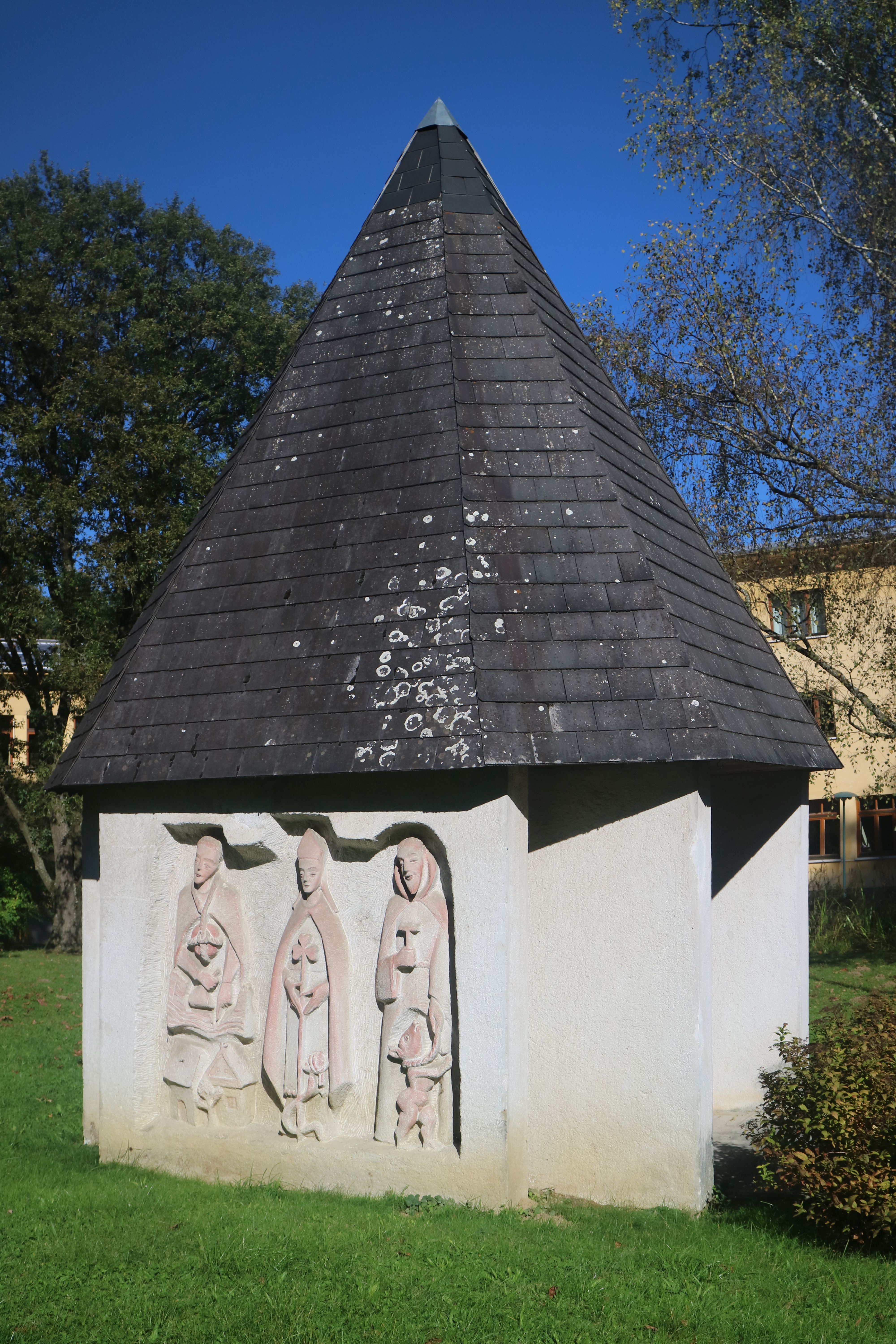 Kapelle der Landwirtschaftlichen Fachschule Grottenhof-Hardt in Thal bei Graz (Steiermark) mit Wandrelief von Alfred Schlosser (1967)